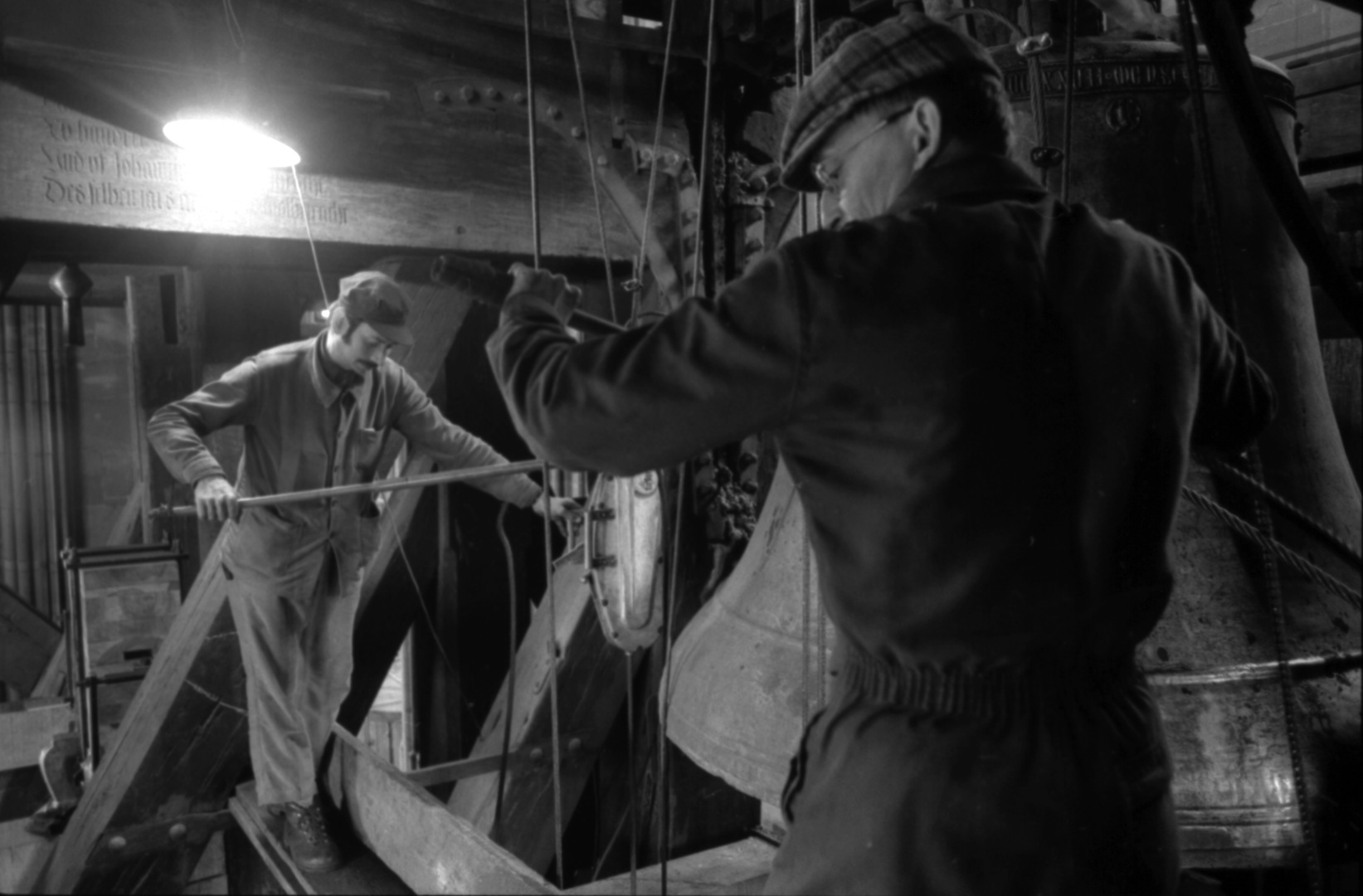 Strasbourg, Cathédrale Notre-Dame, lors de l’installation de nouvelles cloches en 1978.